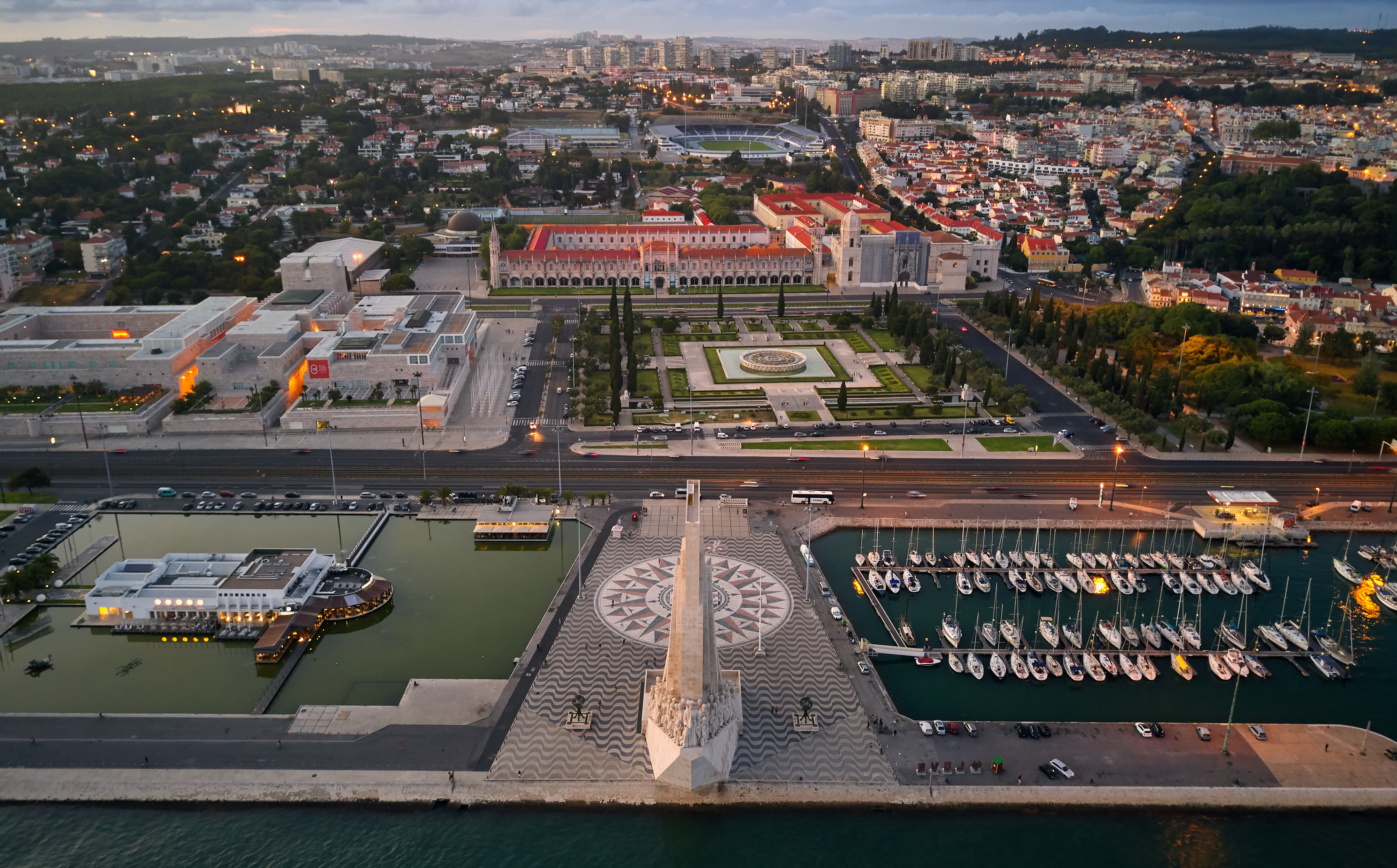 Lisbon